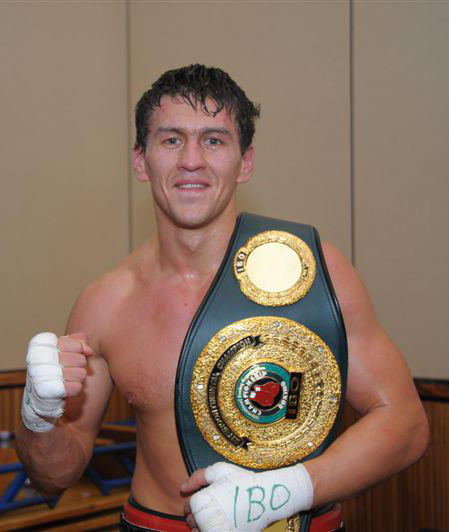 Иса Акбербаев